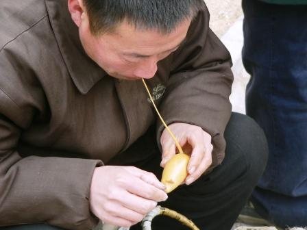 吹糖人，2005年2月14日拍摄于白云观庙会。